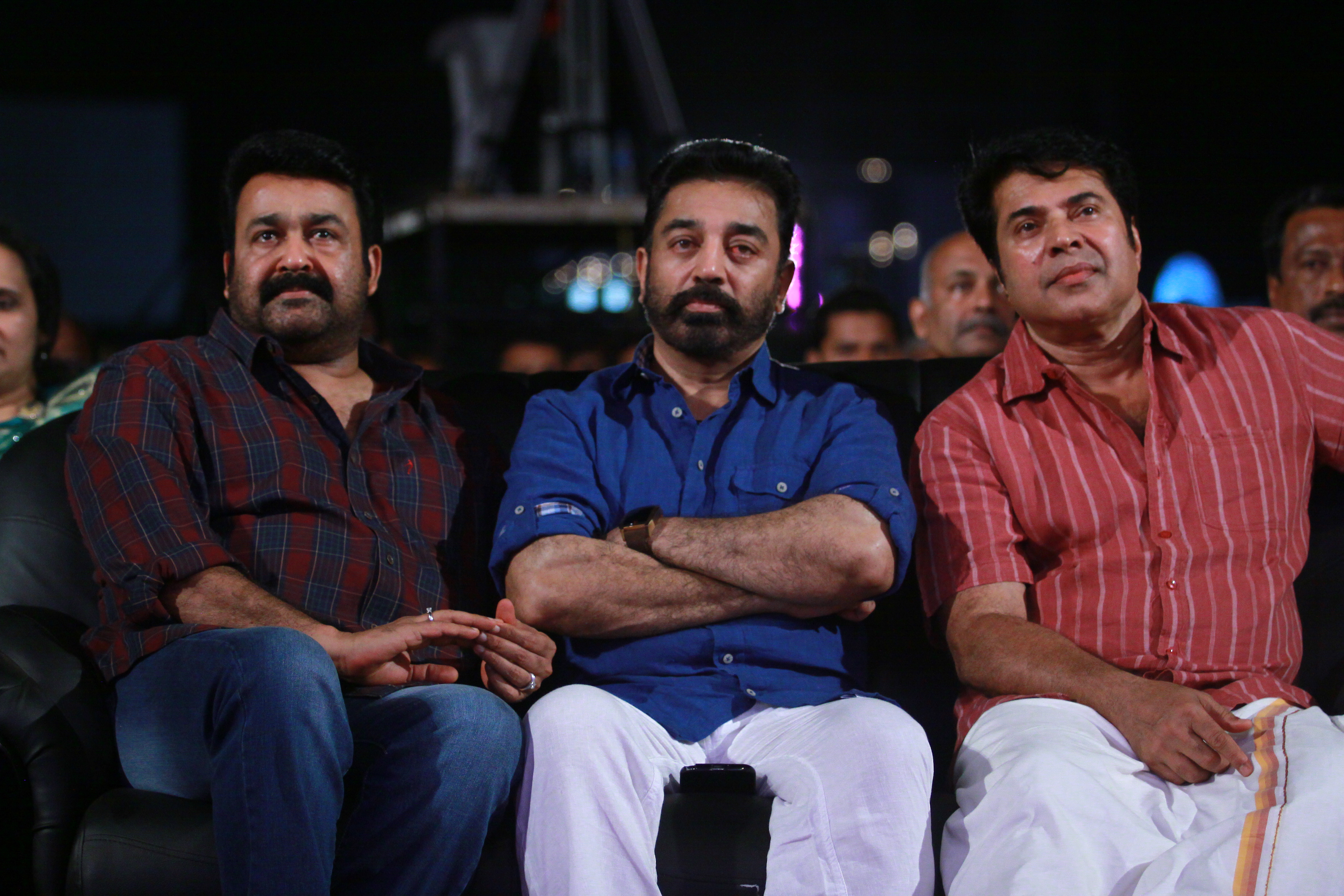 Mohanlal with Mammootty and Kamalhasan.